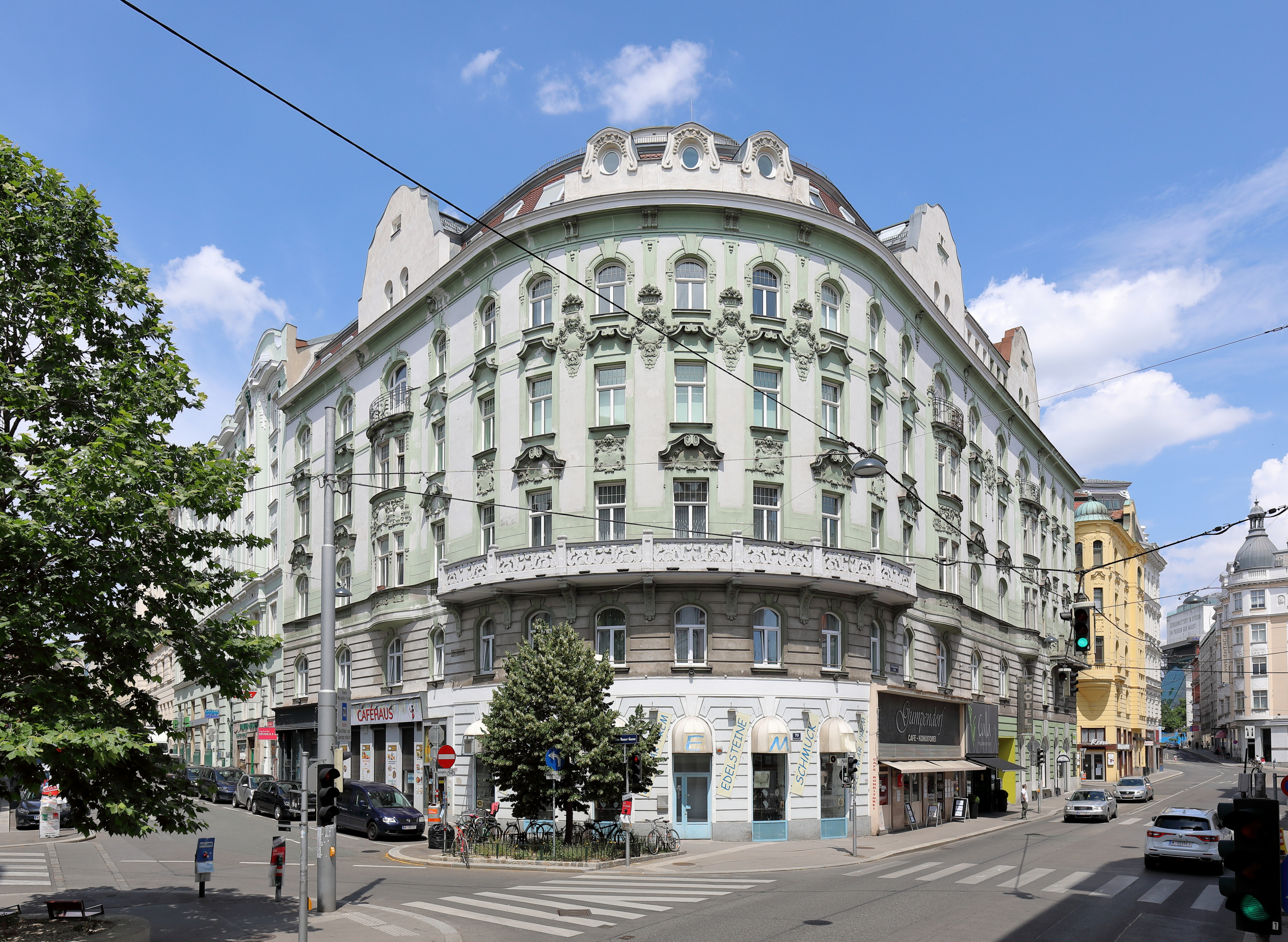 Das Wohnhaus Ecke Gumpendorfer Straße 70 / Otto-Bauer-Gasse 2 (ursprünglich Kasernengasse) im 6. Wiener Bezirk Mariahilf.Das Wohnhaus mit weit ausladender Eckrundung, durchgehendem Balkon sowie geschwungenen Giebelaufsätzen wurde nach Plänen des Architekten Carl Caufal um 1905/1910 errichtet. Im Jahr 1914 mietete Otto Bauer, Begründer des Austromarxismus, darin eine gutbürgerliche Wohnung an und bewohnte sie bis zu seiner Flucht 1934. Ihm zu Ehren wurde die ehemalige Kasernengasse 1949 in Otto-Bauer-Gasse umbenannt.